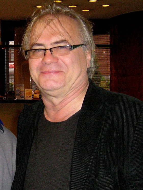 Jacek Bromski (ur. 19 grudnia 1946 we Wrocławiu) - polski reżyser, scenarzysta, producent.